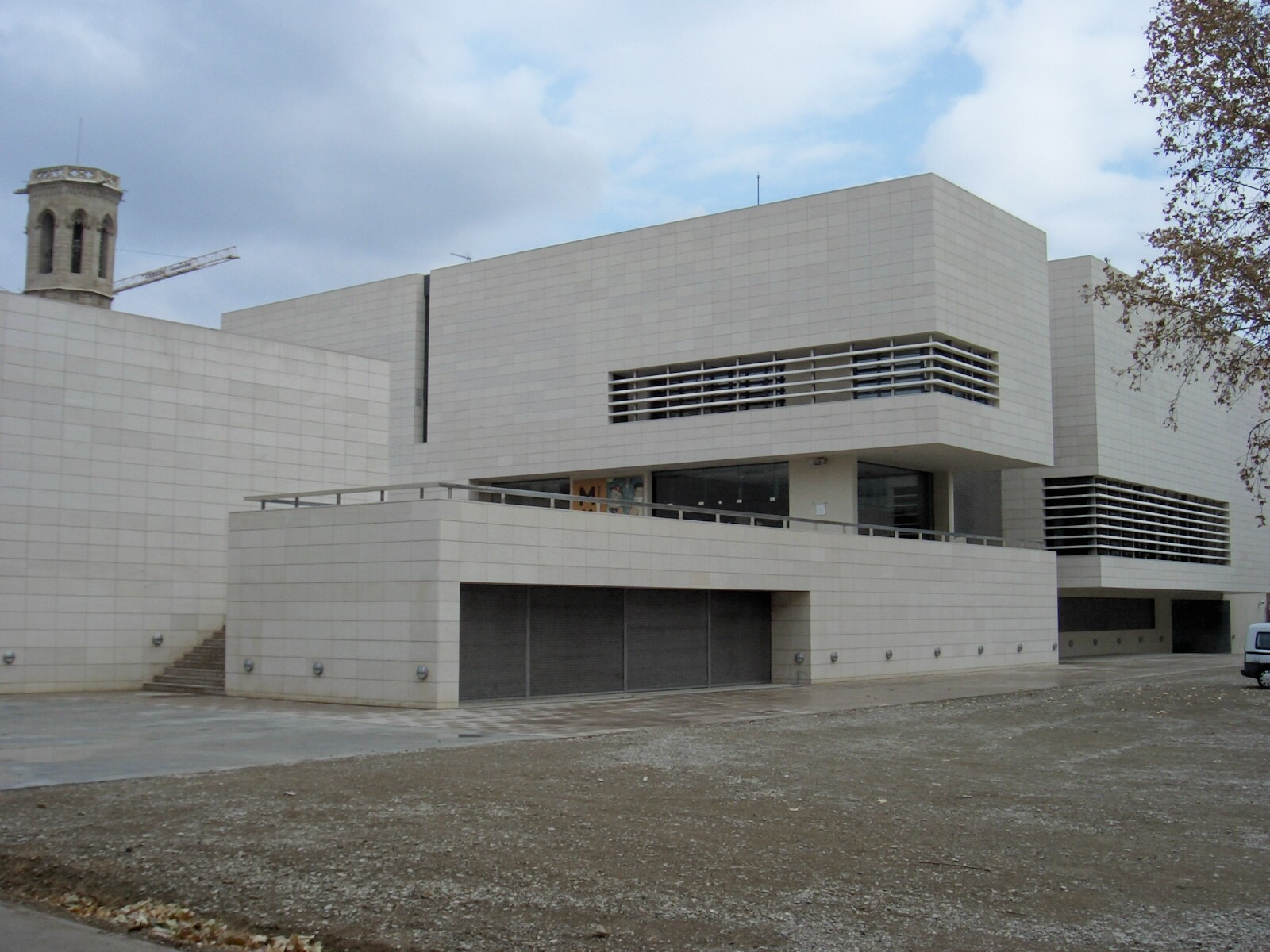 La nova seu del Museu de Lleida, en construcció